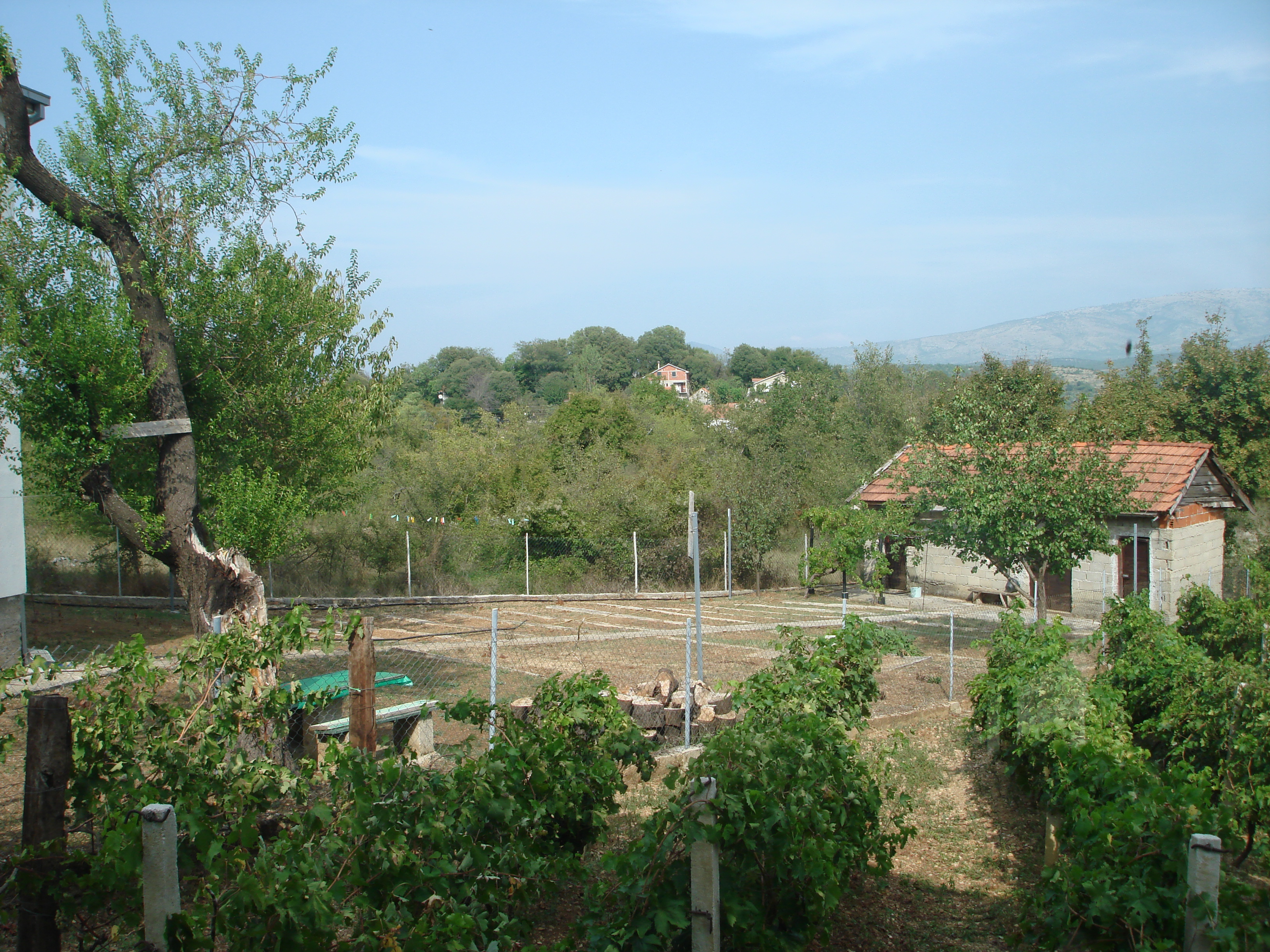 pogled na Jukice iz Midenjaka